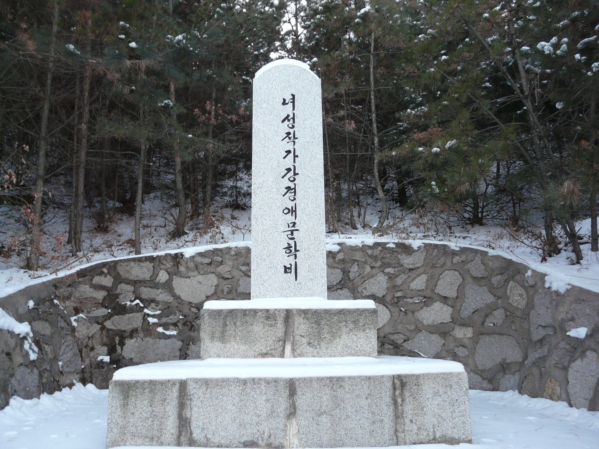 龍井市街、琵岩山の中腹に1999年8月8日に建てられた「女性作家姜敬愛文学碑」